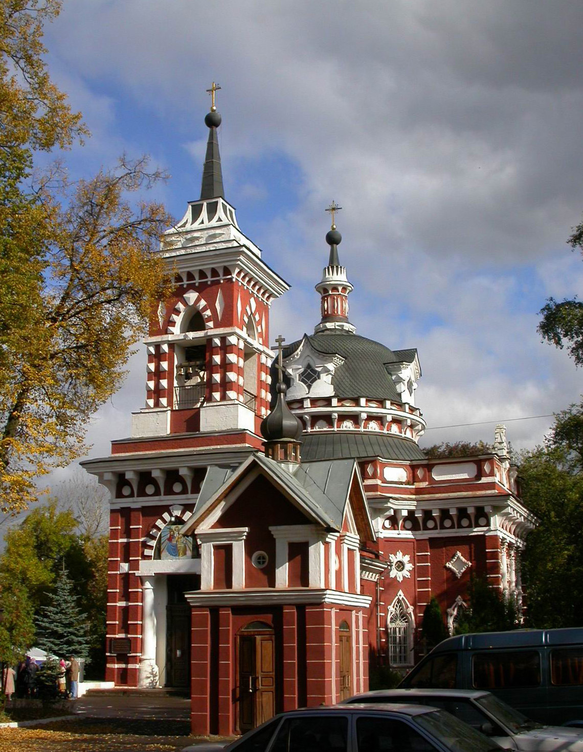 церковь Смоленской иконы Божией Матери